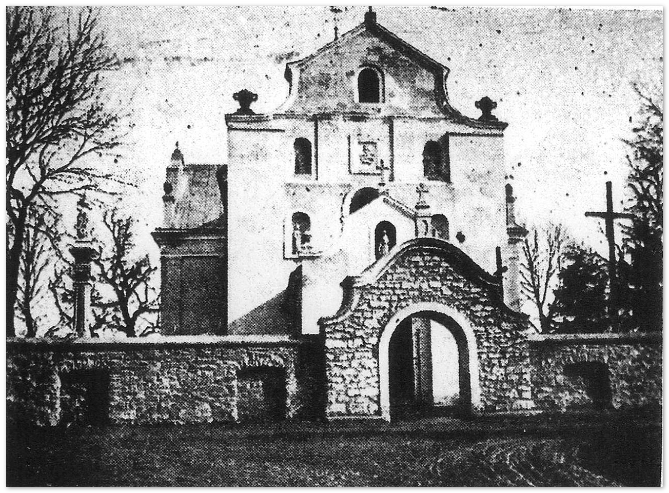 Гримайлівський костьол у польські часи